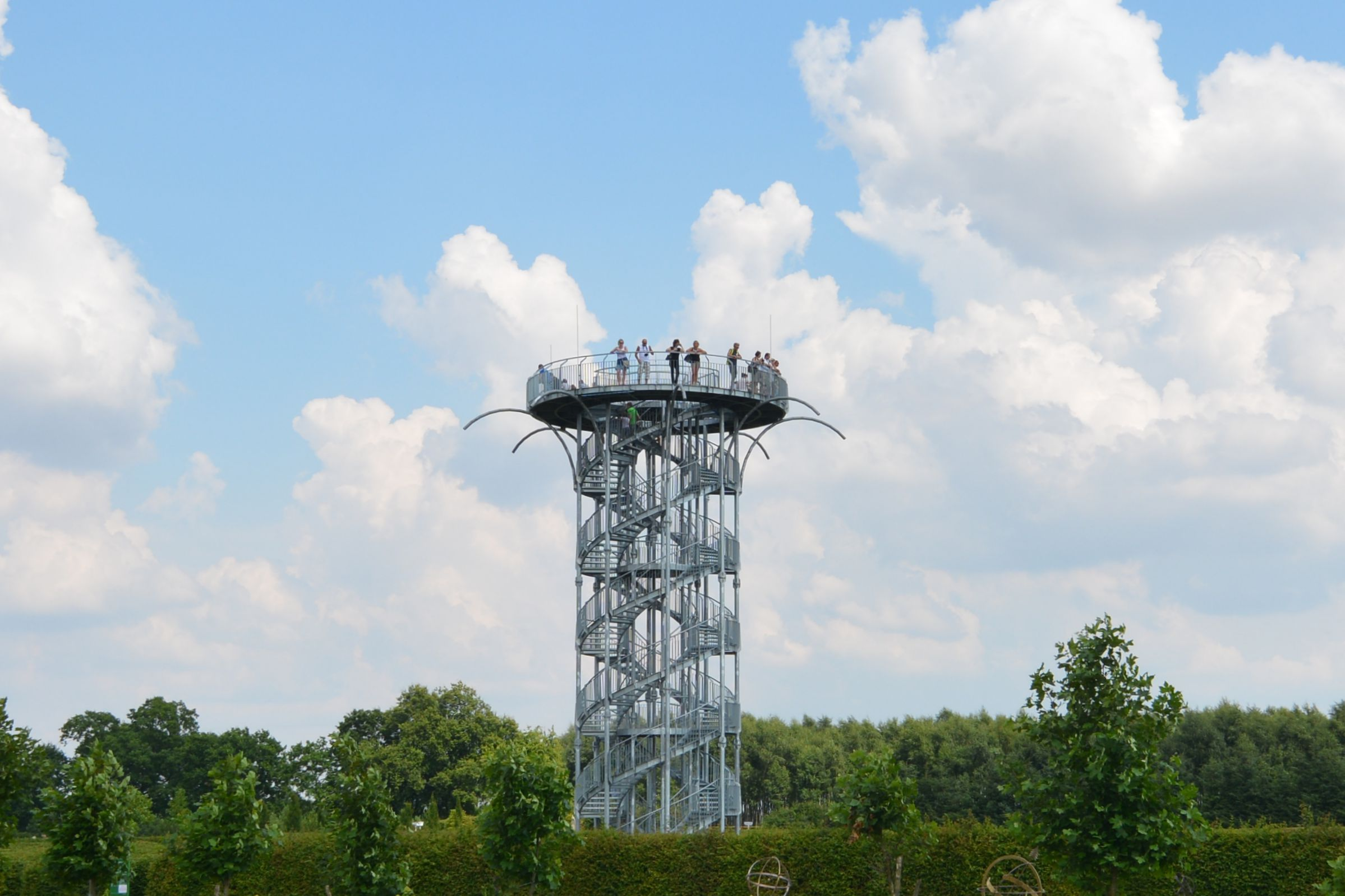 Ogrody Hortulus Spectabilis w Dobrzycy (powiat koszaliński)